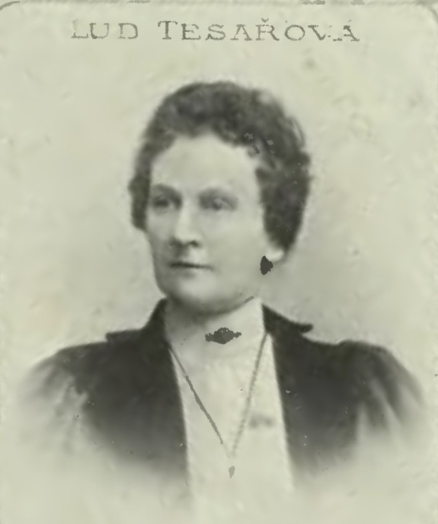 Portrét – Ludmila Tesařová (1857 - 1936), Česká učitelka a spisovatelka.